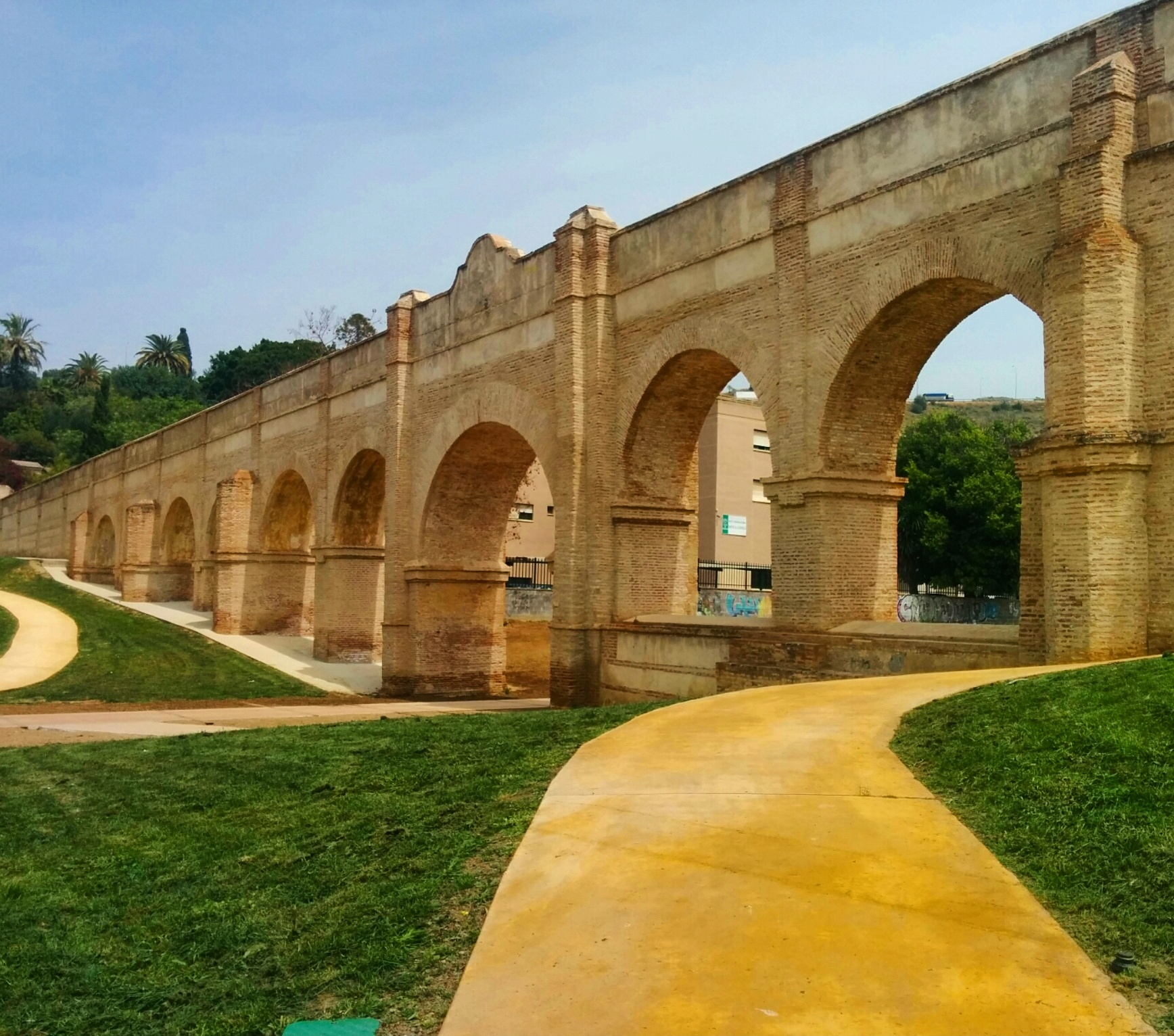 Puente de Arroyo Quintana, Acueducto de San Telmo, Málaga, España.